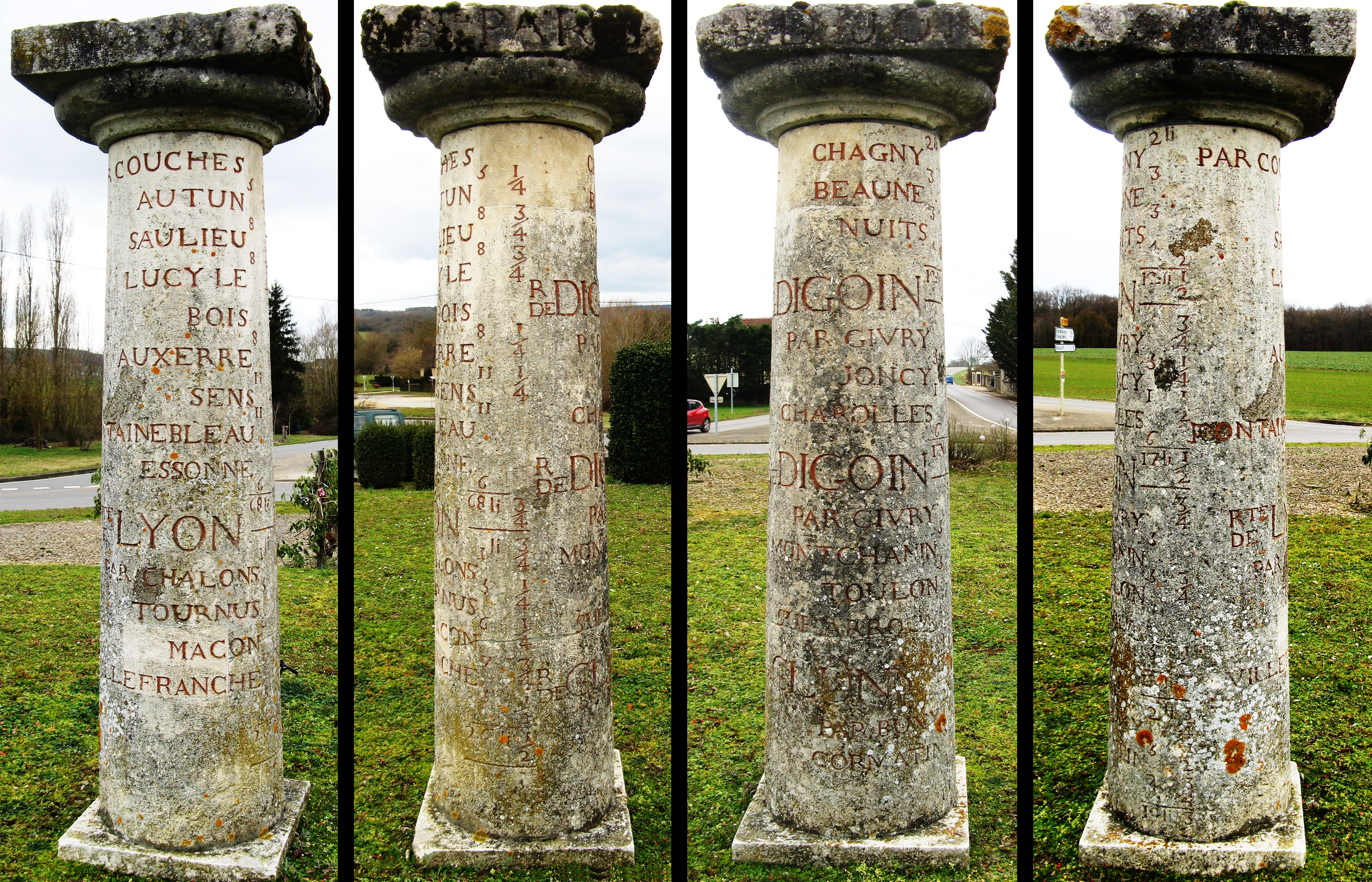 Mellecey : borne-colonne de Marloux.